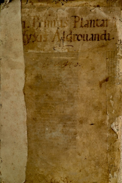 Erbario di Ulisse Aldrovandi, Front cover of vol. 1